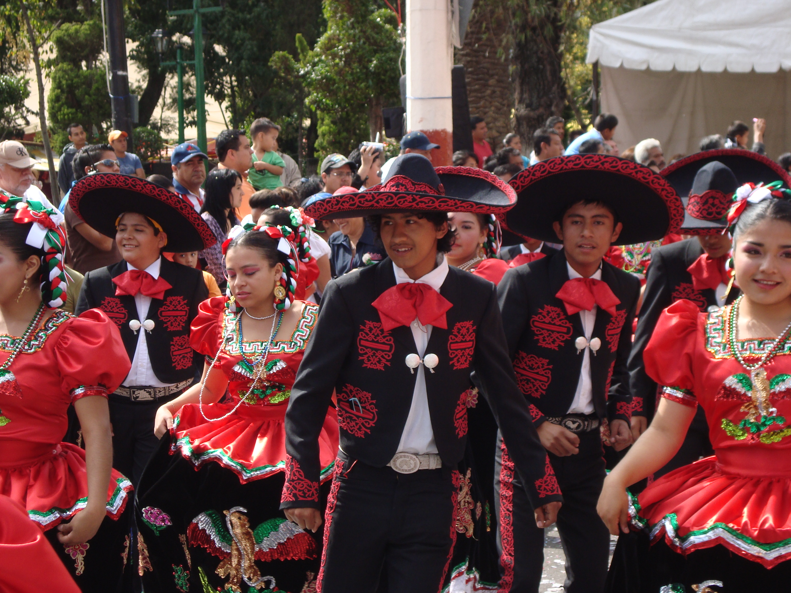 Participación de la Comparsa de los Charros de Tláhuac en el desfile del 16 de septiembre de 2010; a su paso frente al edificio de gobierno en San Pedro Tláhuac (D. F.).